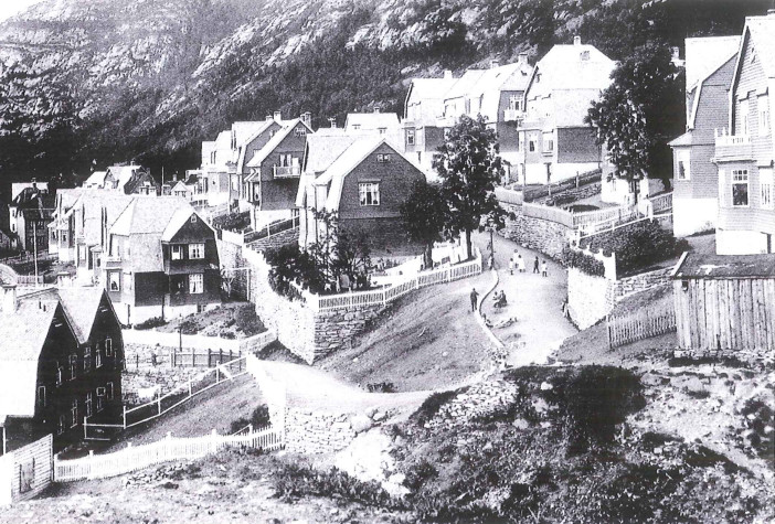 Typebyen sommeren 1915, fotografert fra der Sophus Pihls gate ligger i dag.